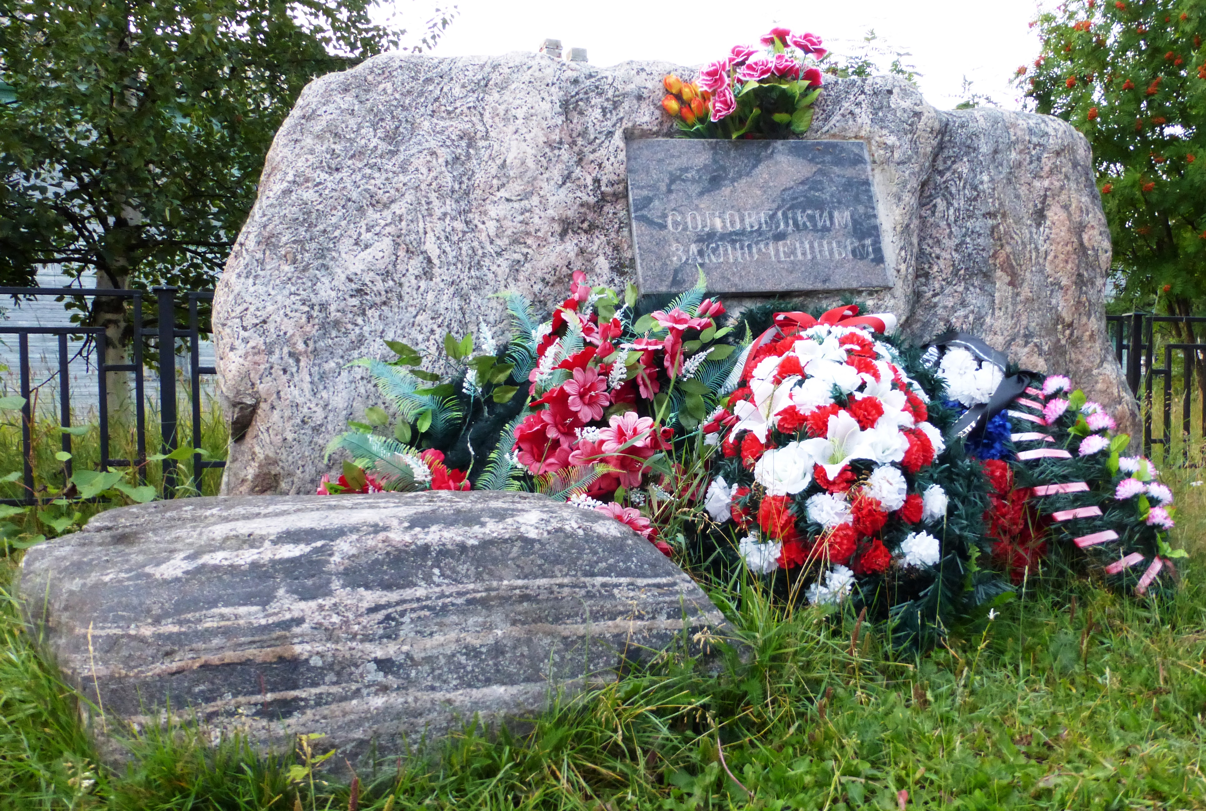 Памятный камень на б.Соловецком острове (пос.Соловецкий)